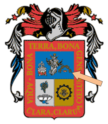 Escudo del Estado de Aguascalientes obtenido de modificado para ilustrar Libertad por un beso, representada por la cadena y los labios.